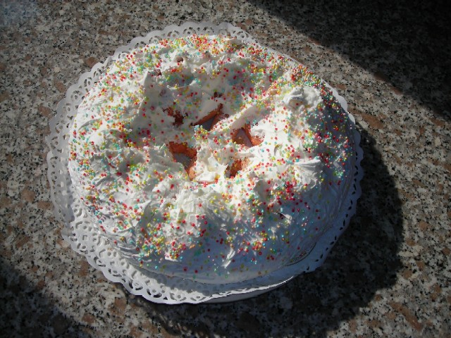 ciaramicola cake, typical of Perugia, Umbria, Italy